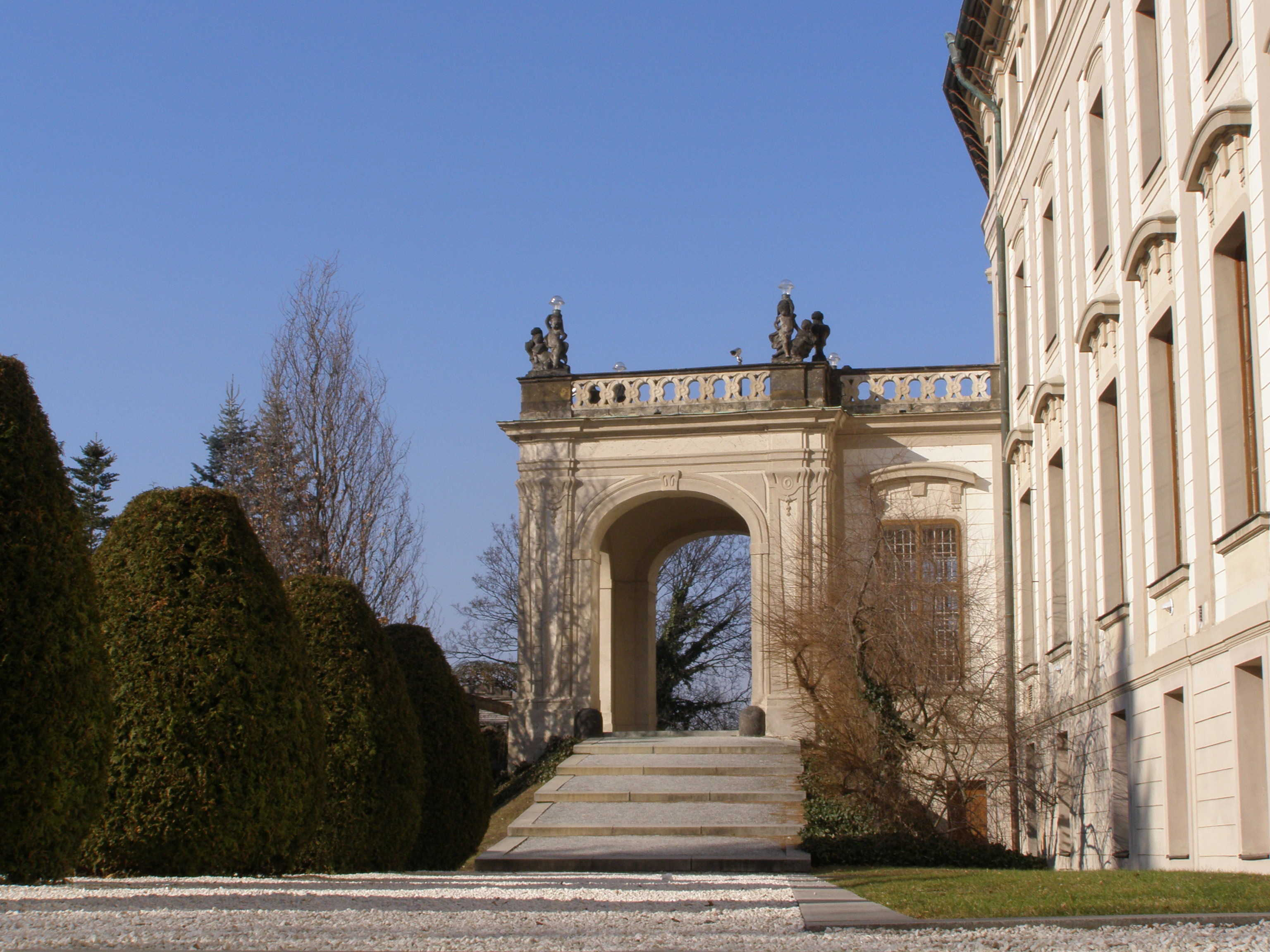 Praha, Hradčany, Hrad, zahrada Na Baště